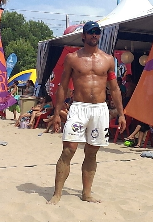 Ignacio Batallán